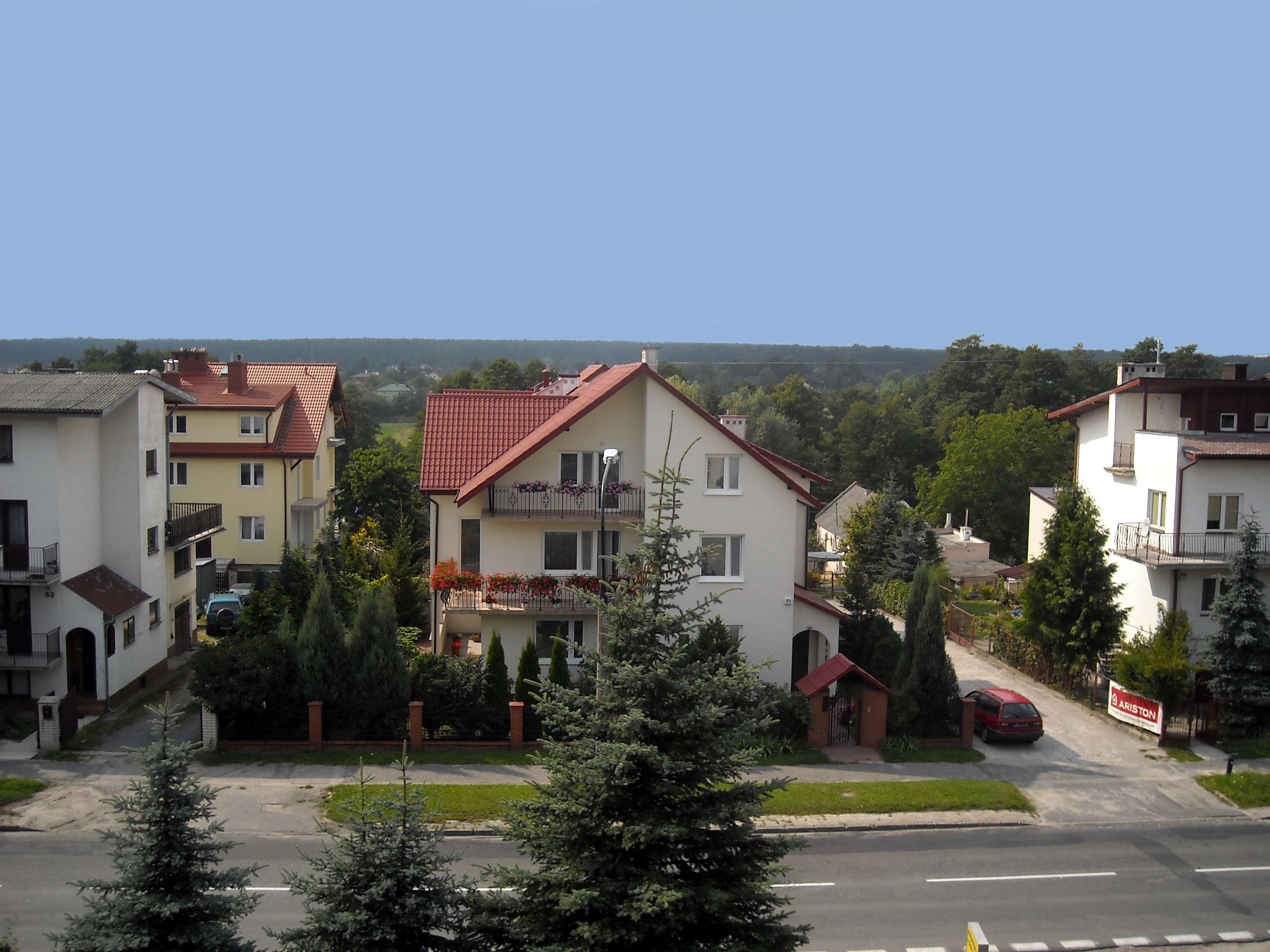 Przy ul. Romera w lubelskiej dzielnicy Wrotków można dostrzec nie tylko bloki, ale przede wszystkim domy jedno- i wielorodzinne